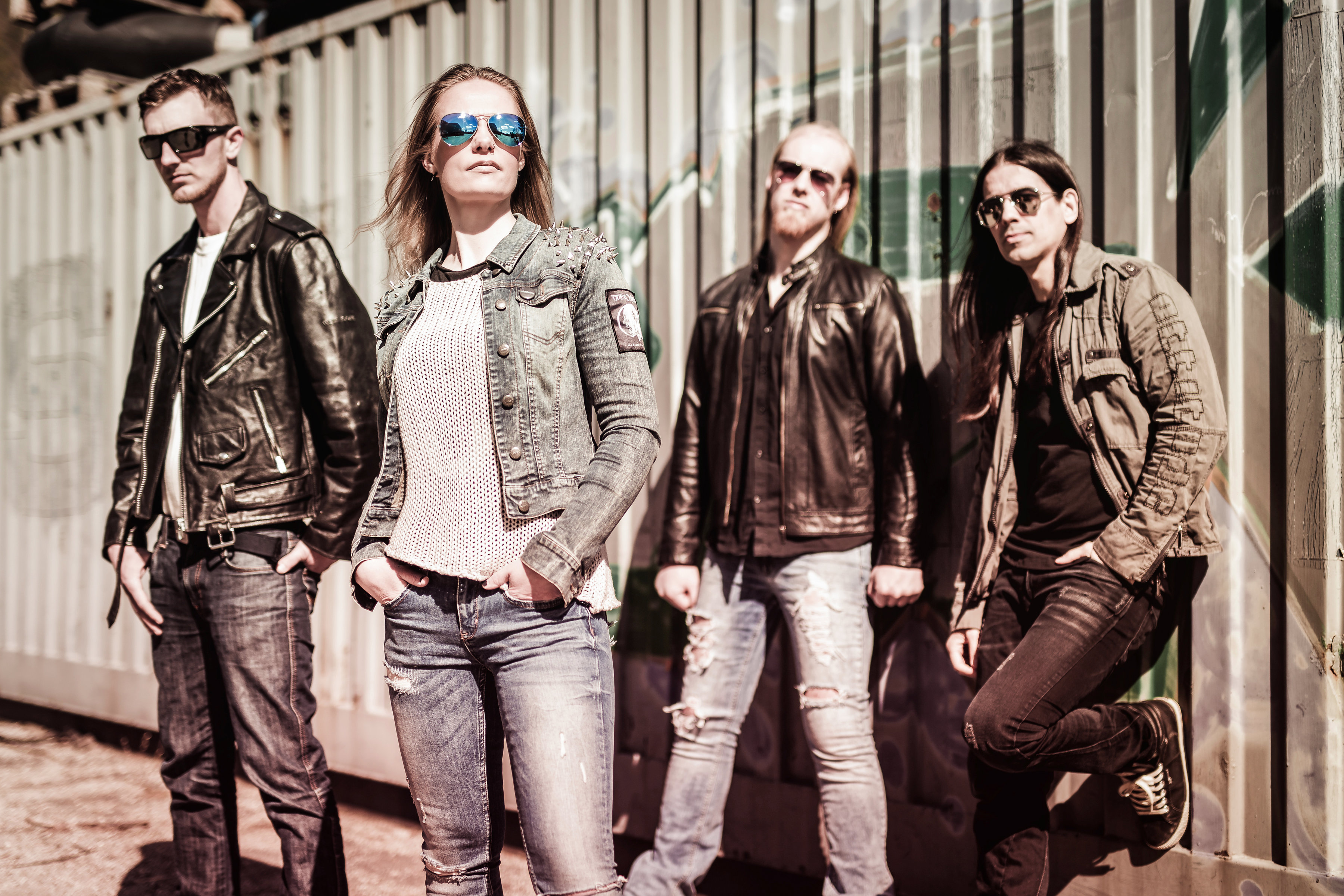 Triosphere